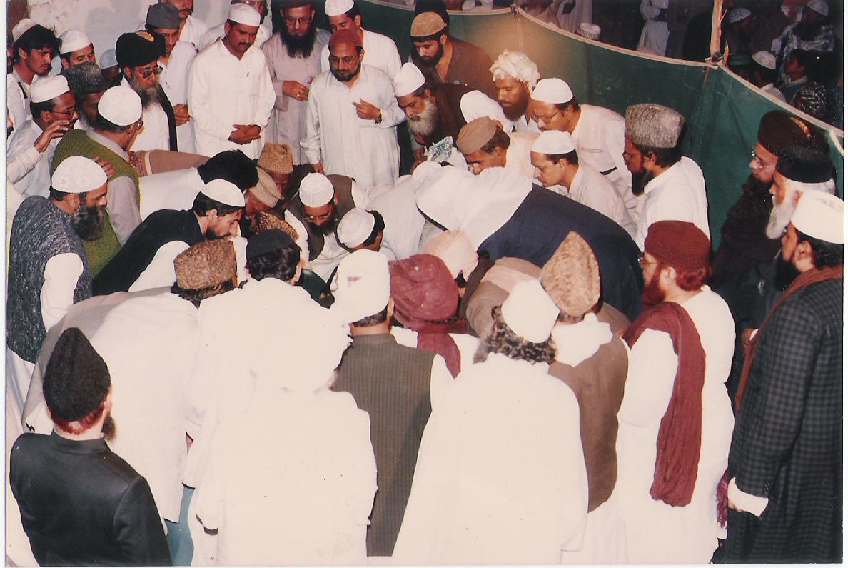 Burial